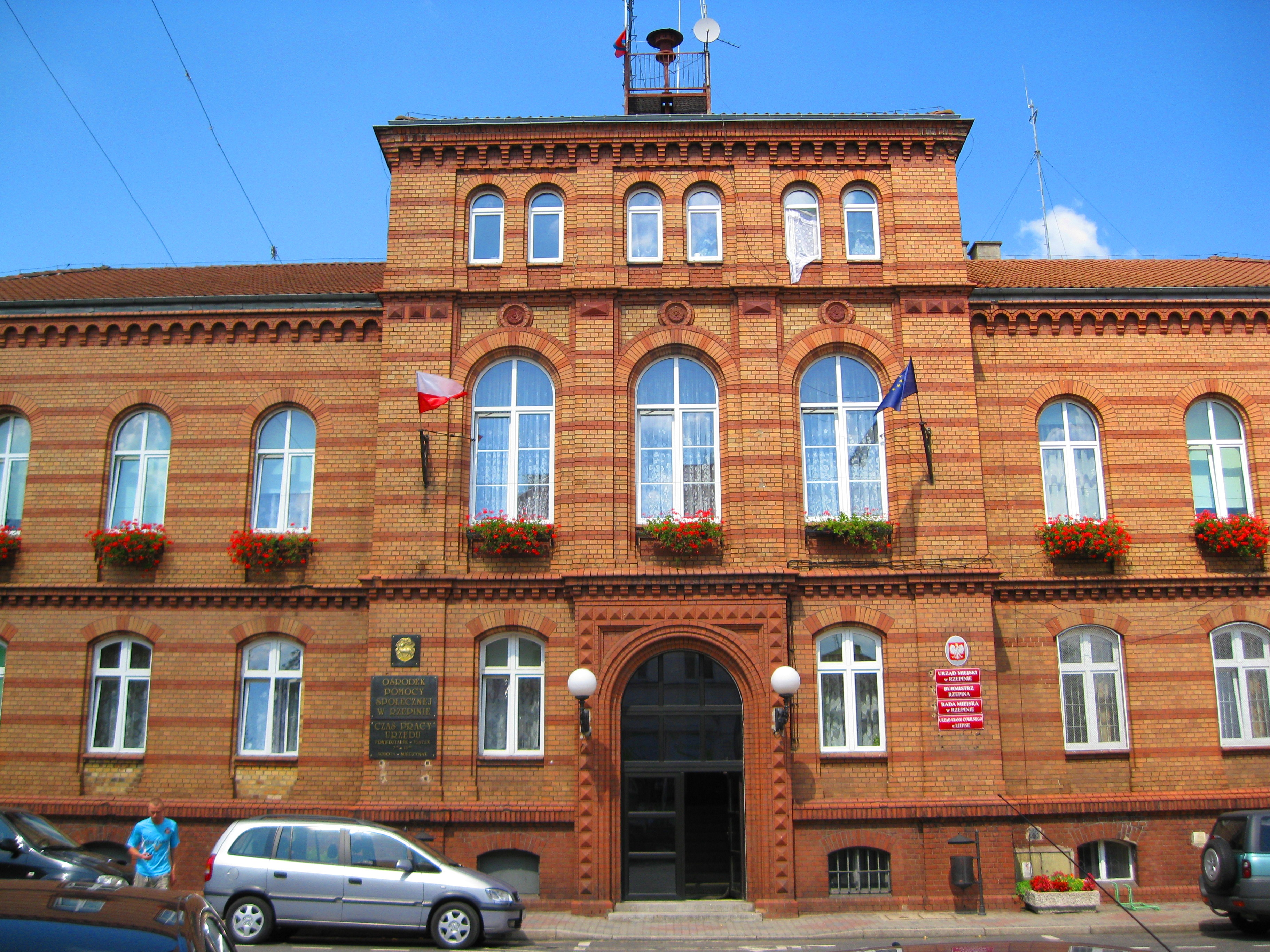 Ratusz w Rzepinie.